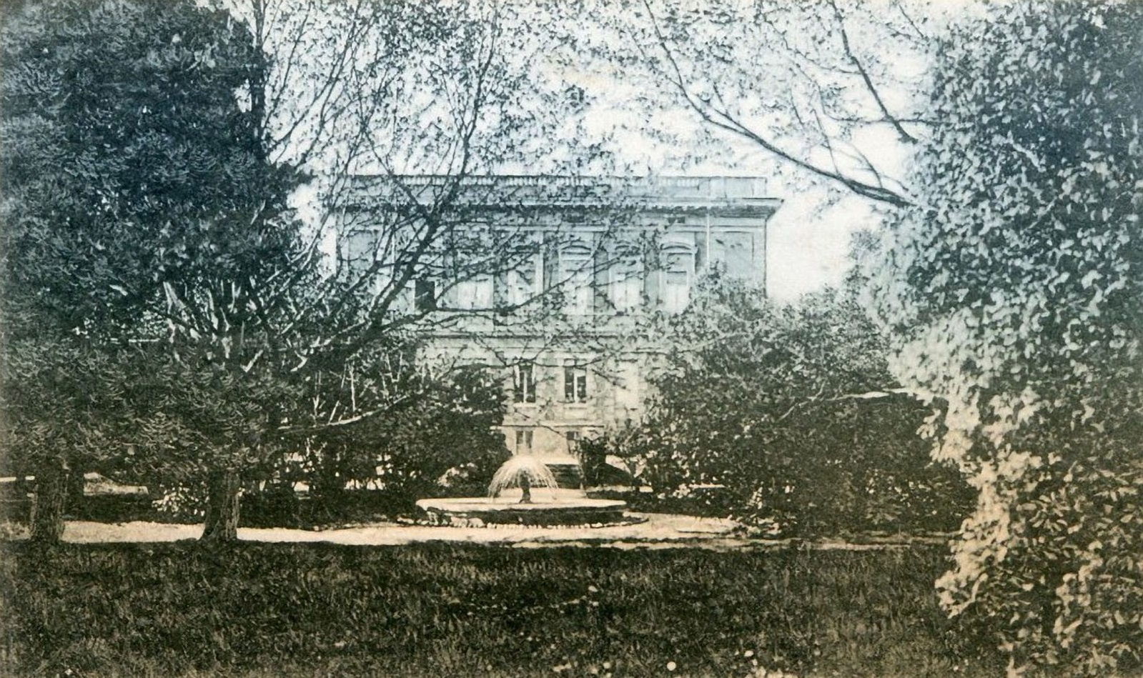 Budynek landratury w Tarnowskich Górach widziany od strony ogrodu (ob. plac Towarzystwa Przyjaciół Dzieci) na starej pocztówce (z l. między 1900 a 1915)